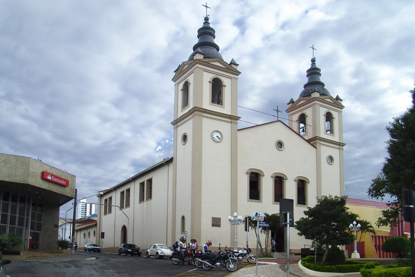 Catedral de Santana no município de Itapeva, estado de São Paulo, Brasil.